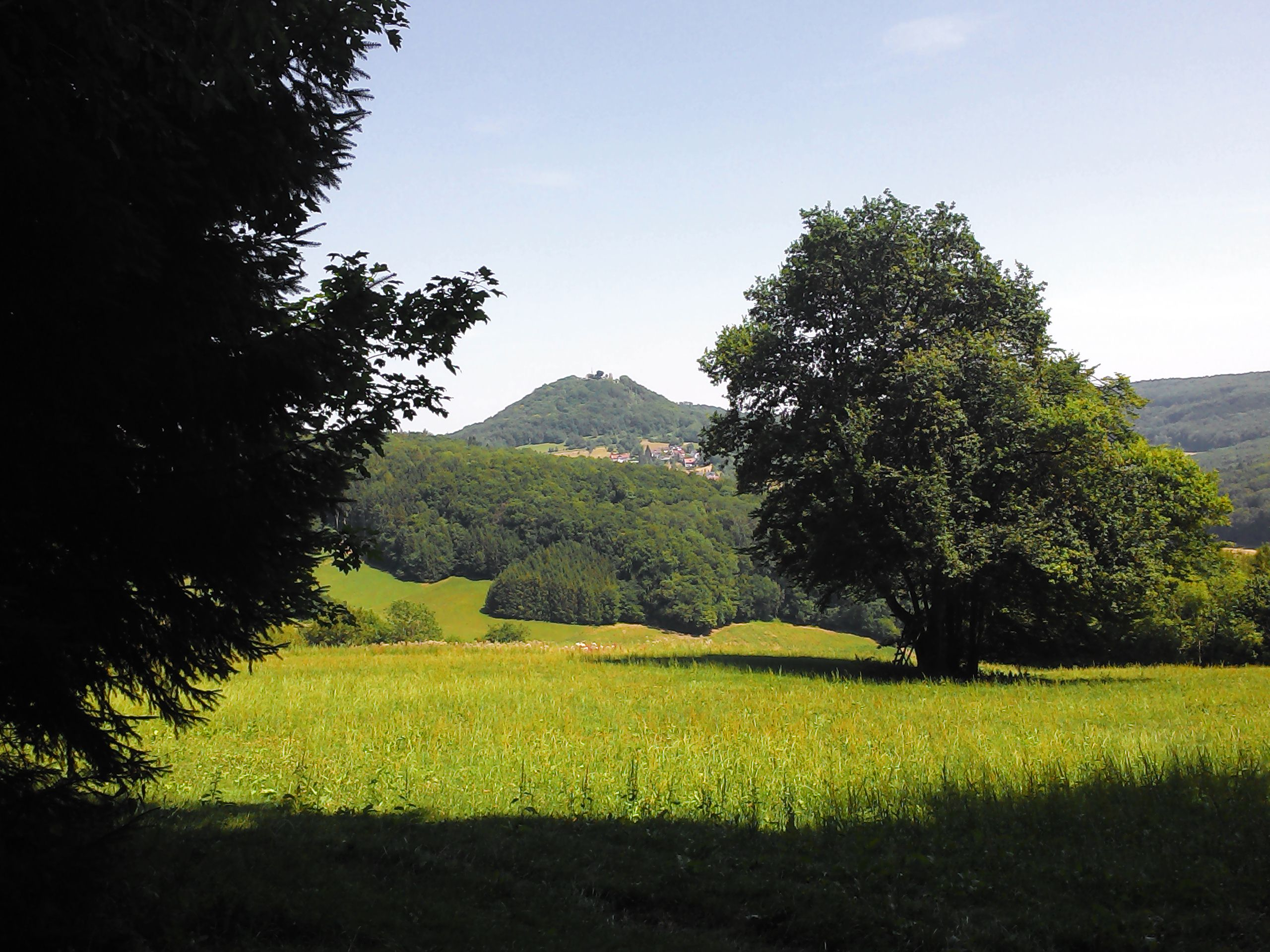 Küssaberg: Blick von Westen auf die Küssaburg. Landkreis Waldshut in Baden-Württemberg.